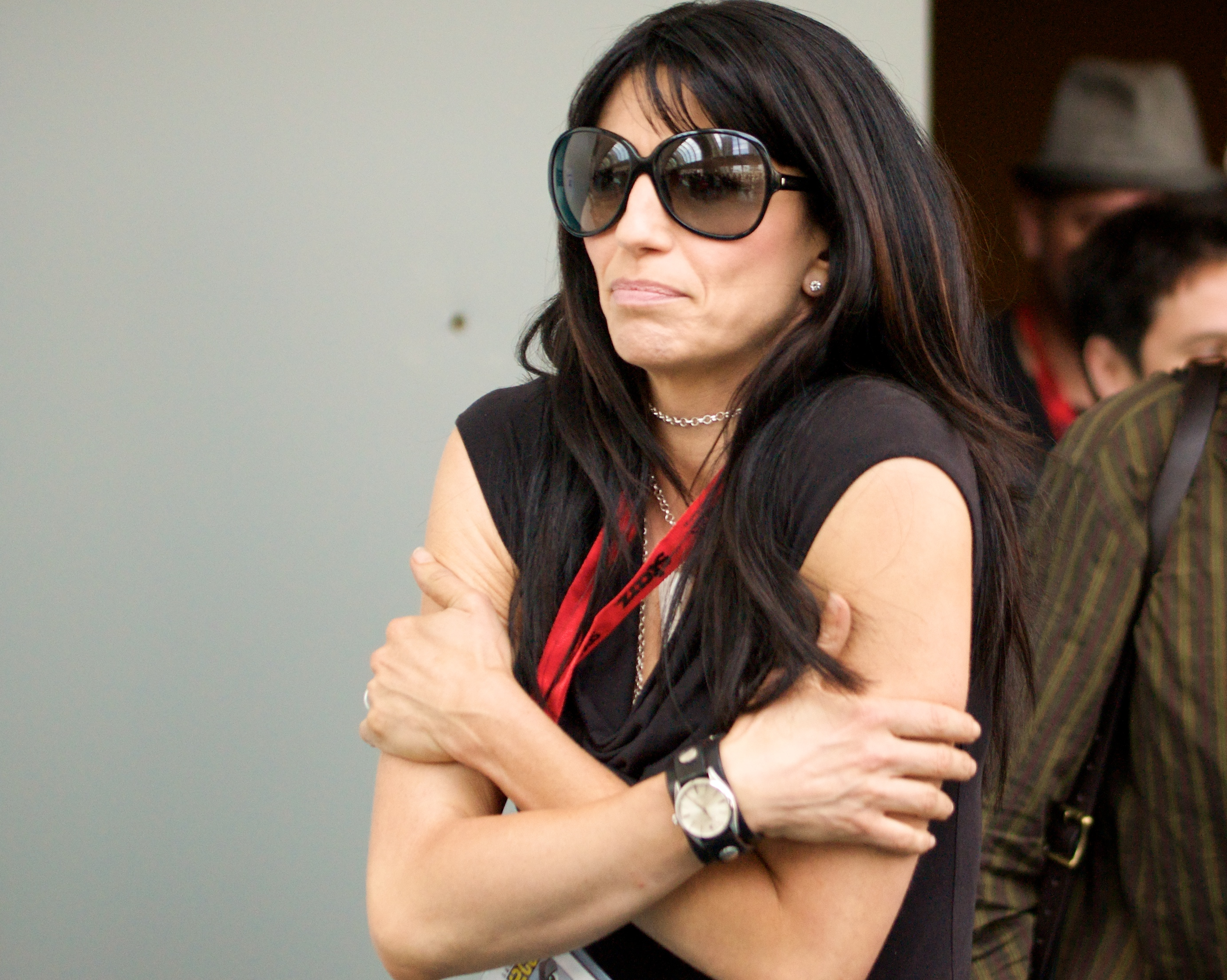 Claudia Black San Diego ComicCon 2009